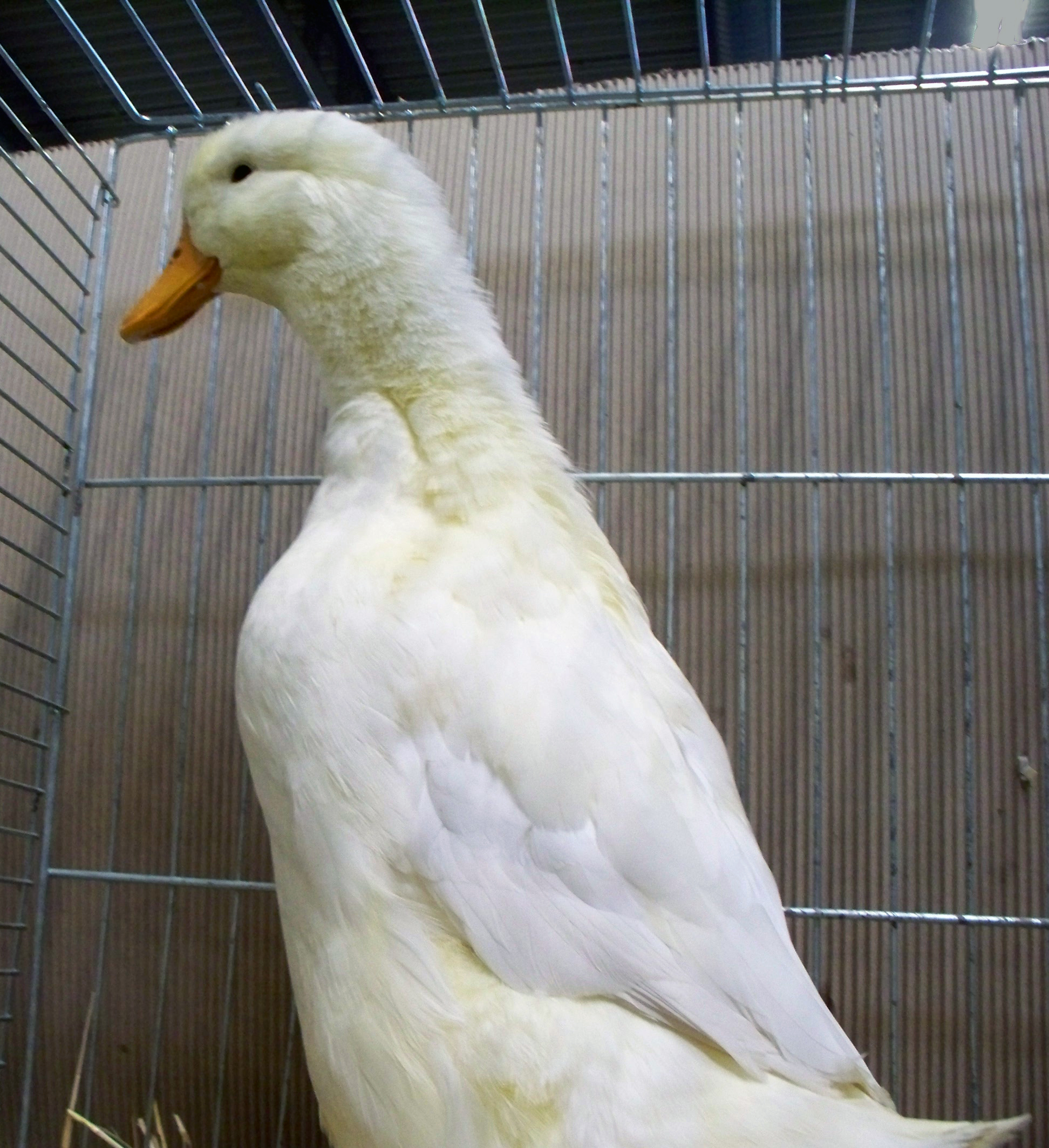 Deutsche Pekingente